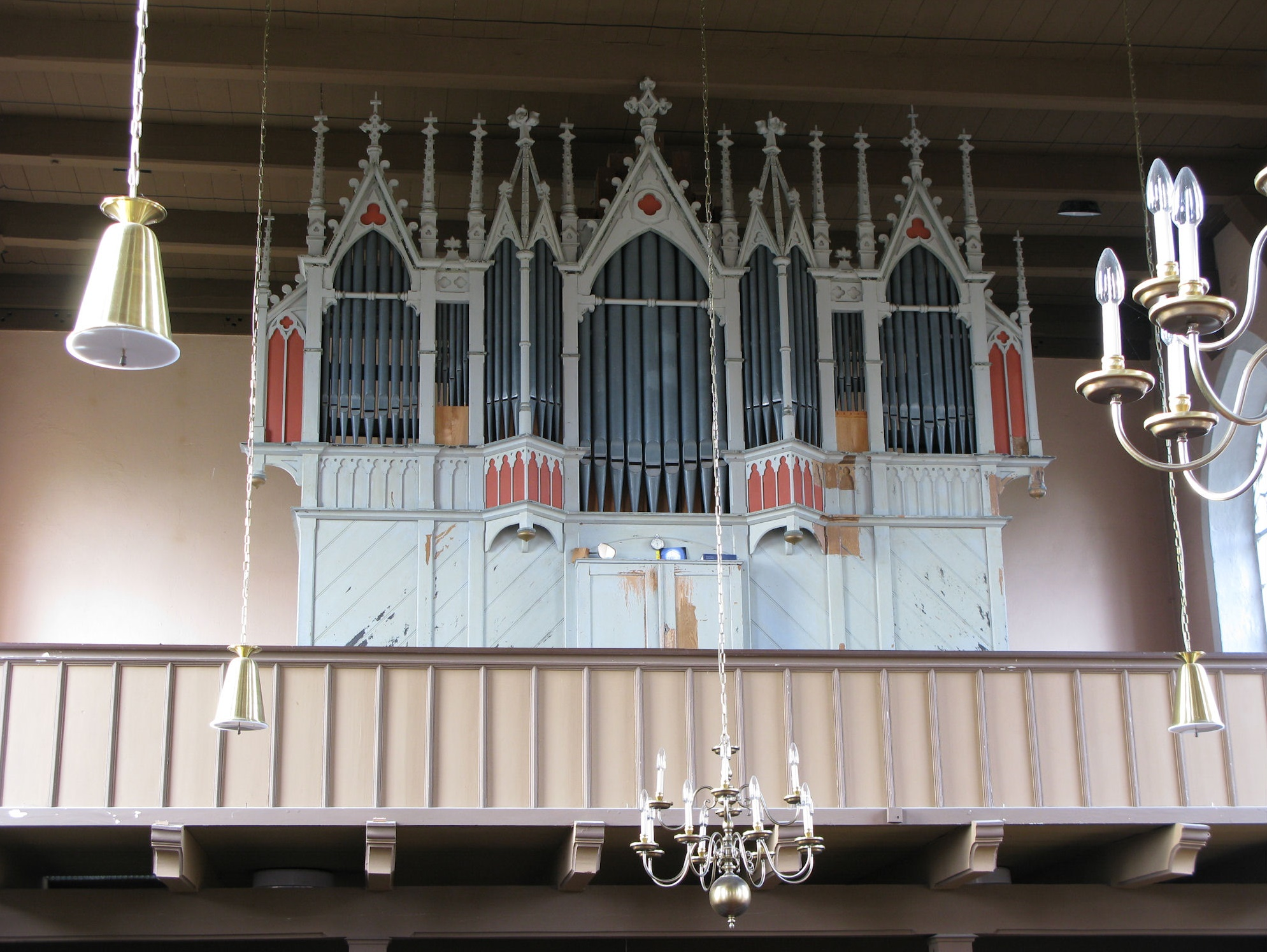 Orgel in Blomberg, Landkreis Wittmund